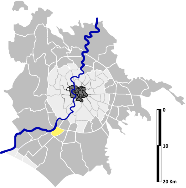 Mezzocammino